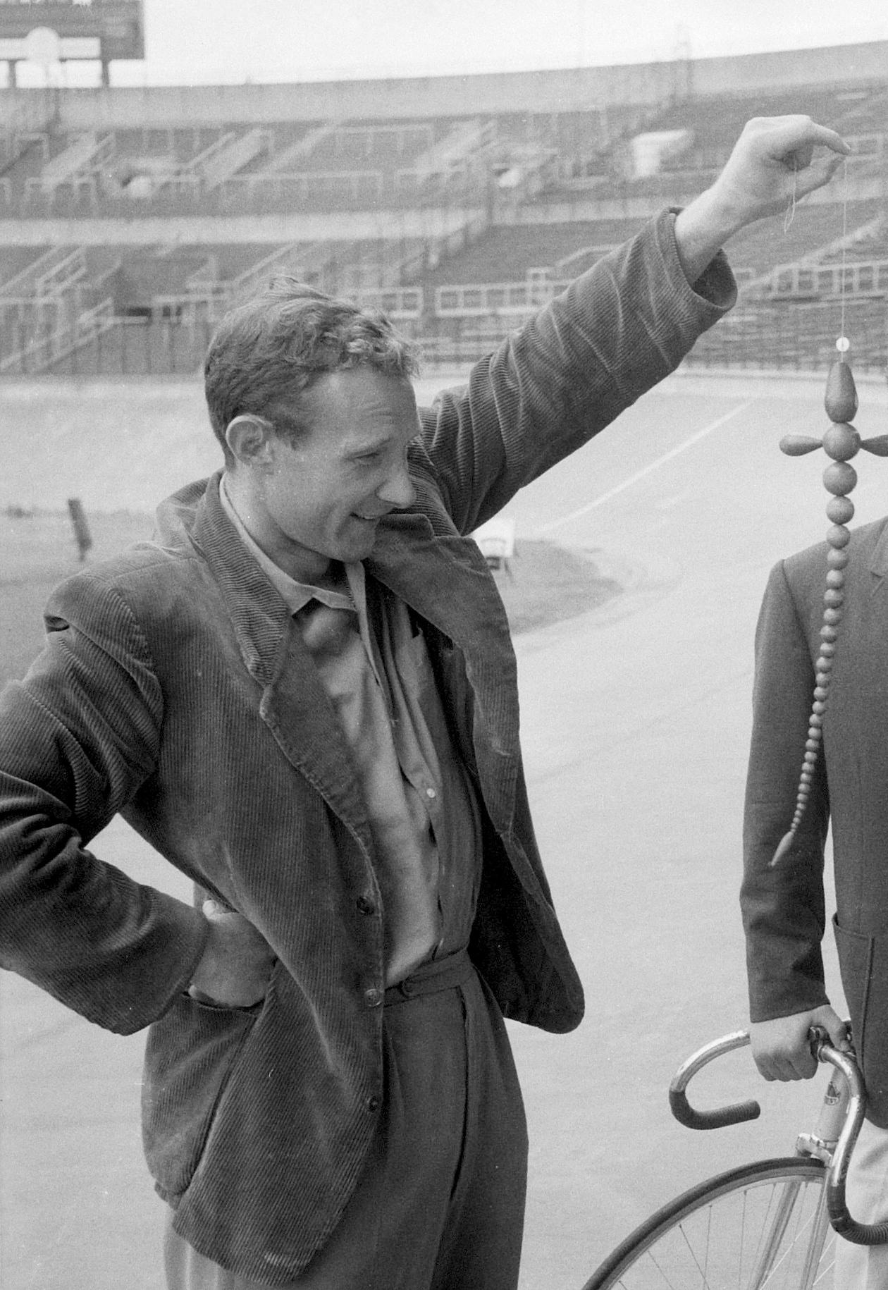 Aankomst eerste renners van de wereldkampioenschap wielrennen, Hijzelendoorn